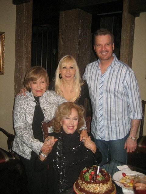 Rosita Fornés - Celebración del cumpleaños número 87 de la vedette cubana.